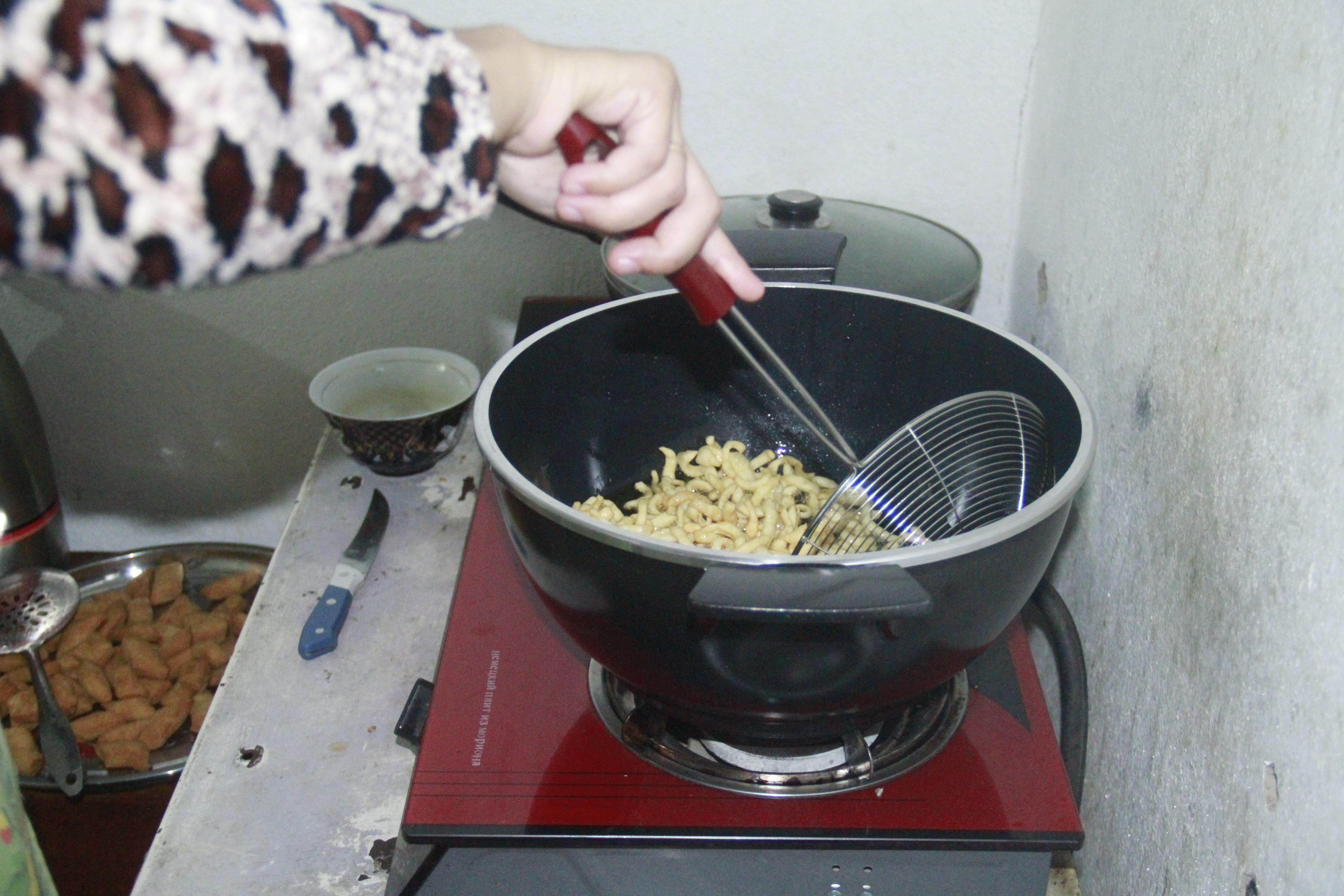 Тоҷикӣ: Чак-чак (7)